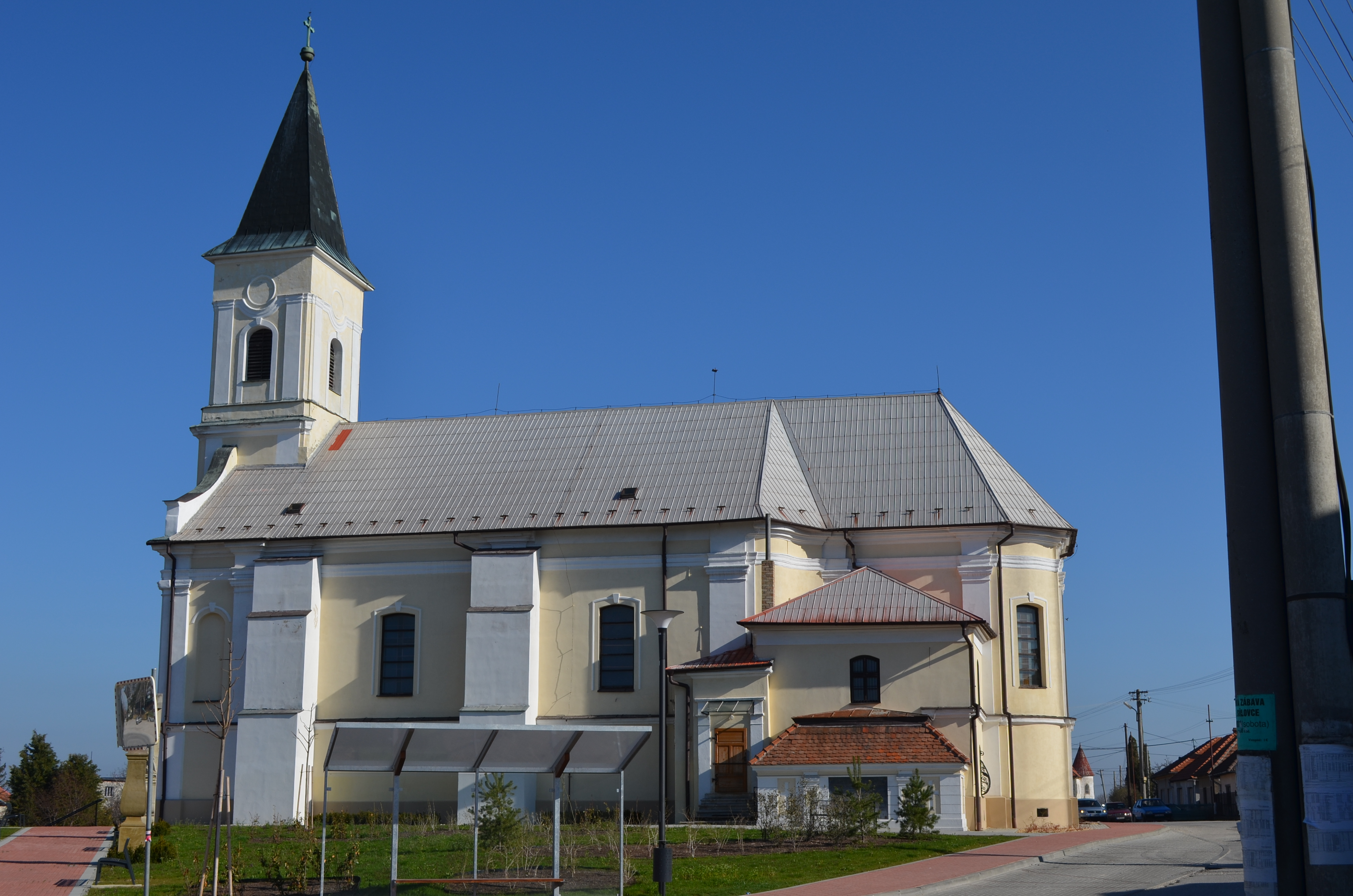 Oponice (okr. Topoľčany), Kostol svätých Petra a Pavla